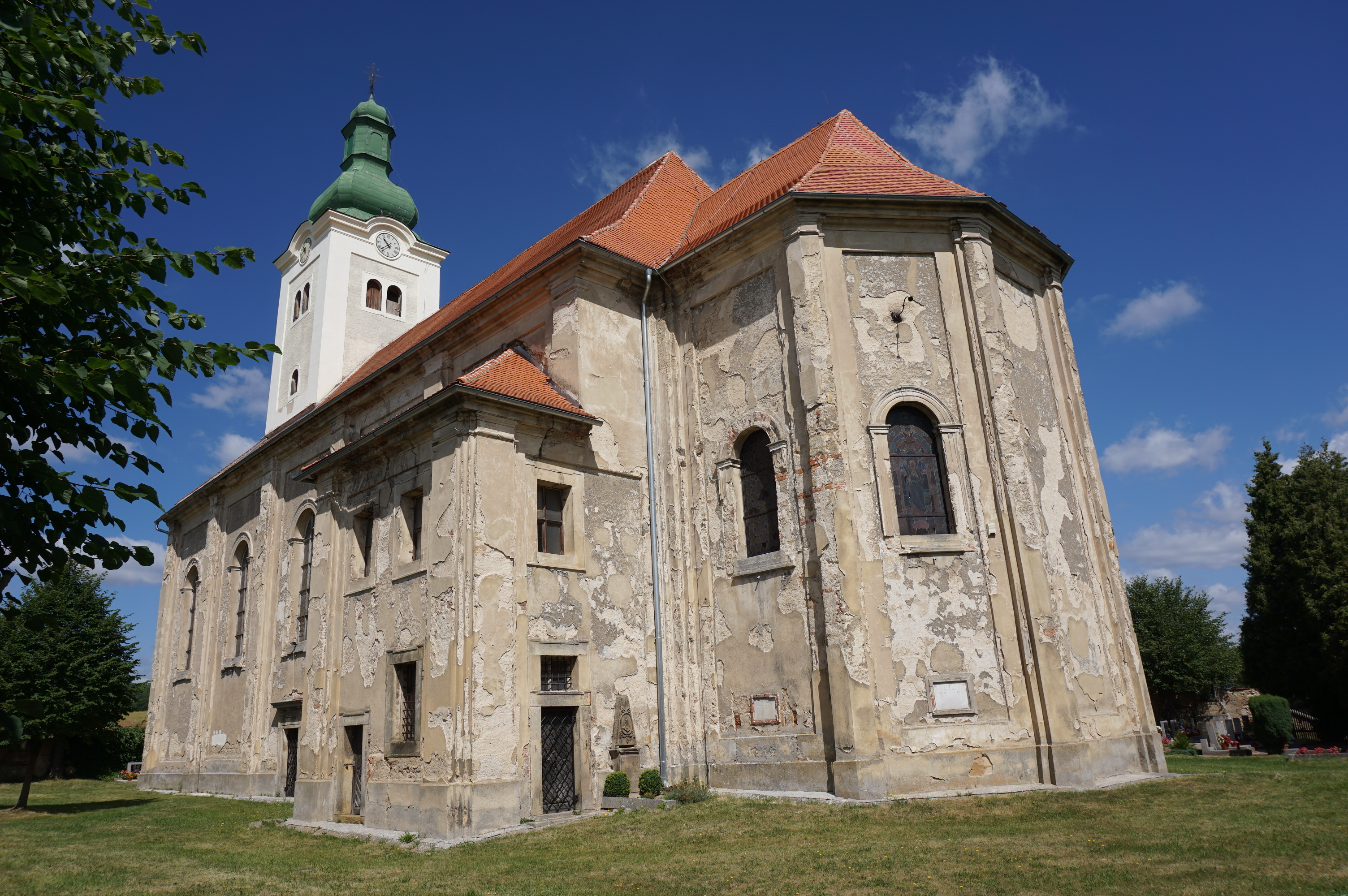 Kostel Narození Panny Marie, Dubnice.